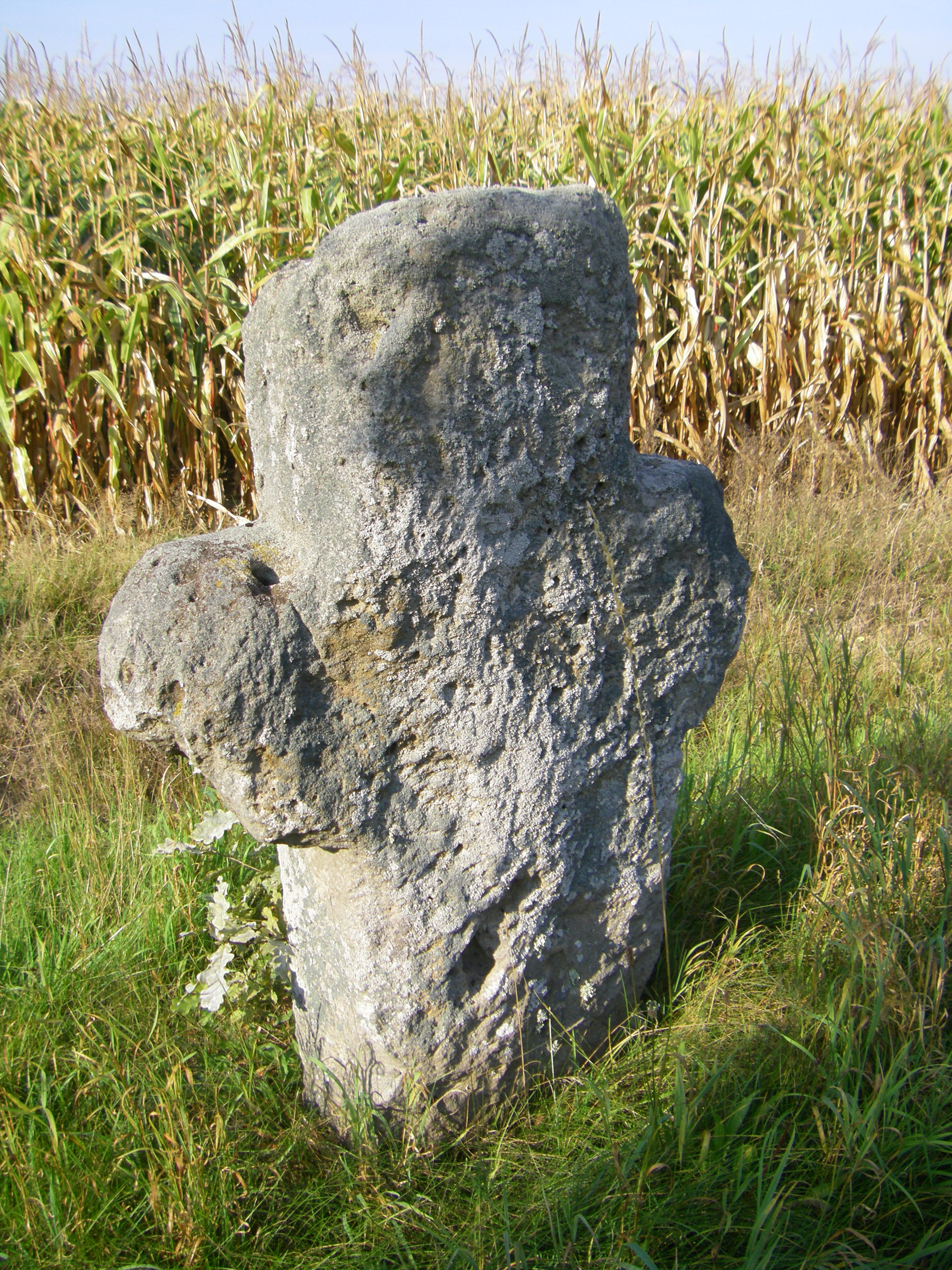 Altes Steinkreuz zwischen Brunn und Kettersbach am Straßenrand; Windsbach